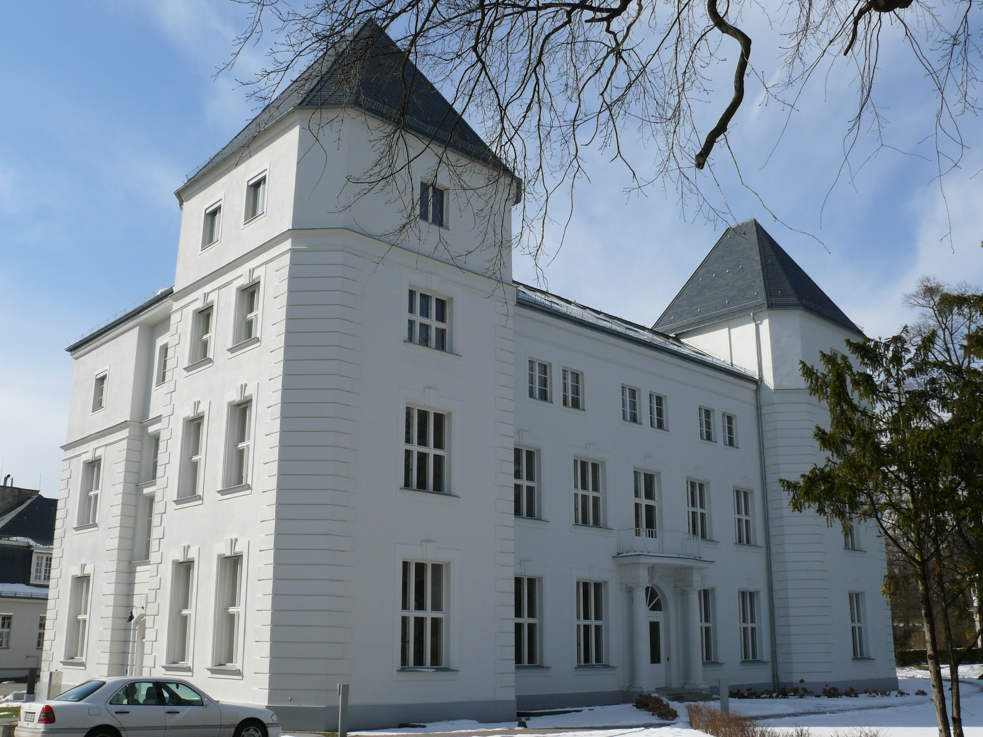 Berlin-Dahlem Fritz-Haber-Institut Haupteingang